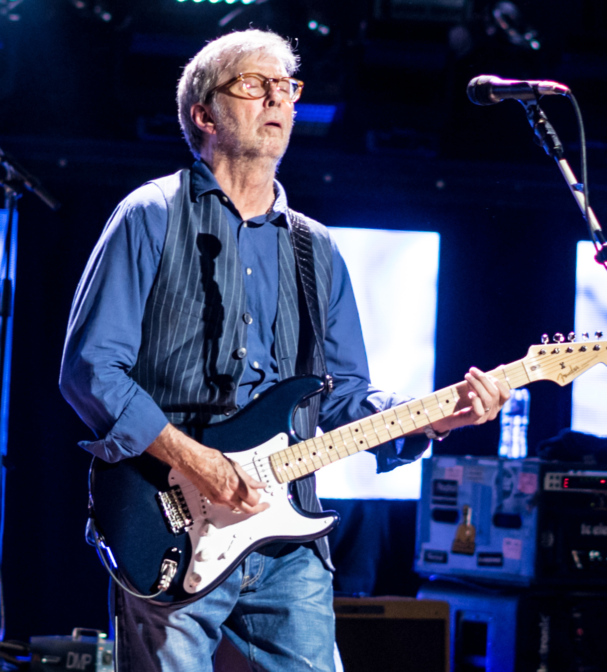 EricClaptonRAH240517-30